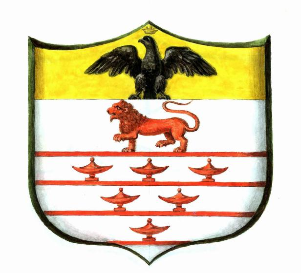 Stemma Odescalchi dal Libro d’oro della nobiltà romana